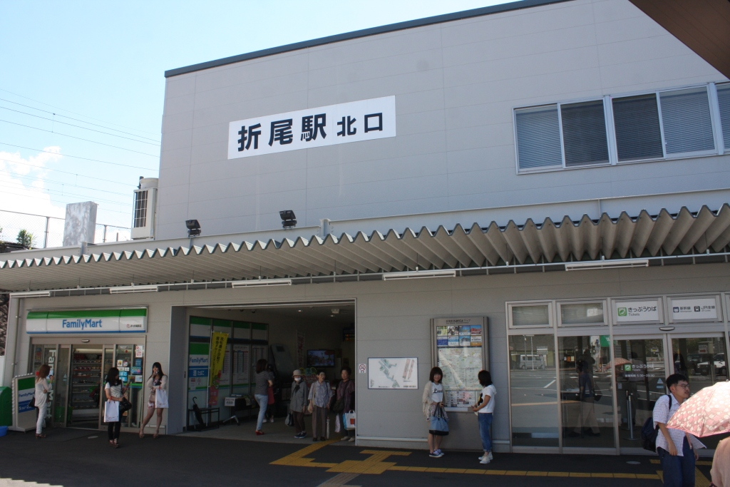 Orio Station